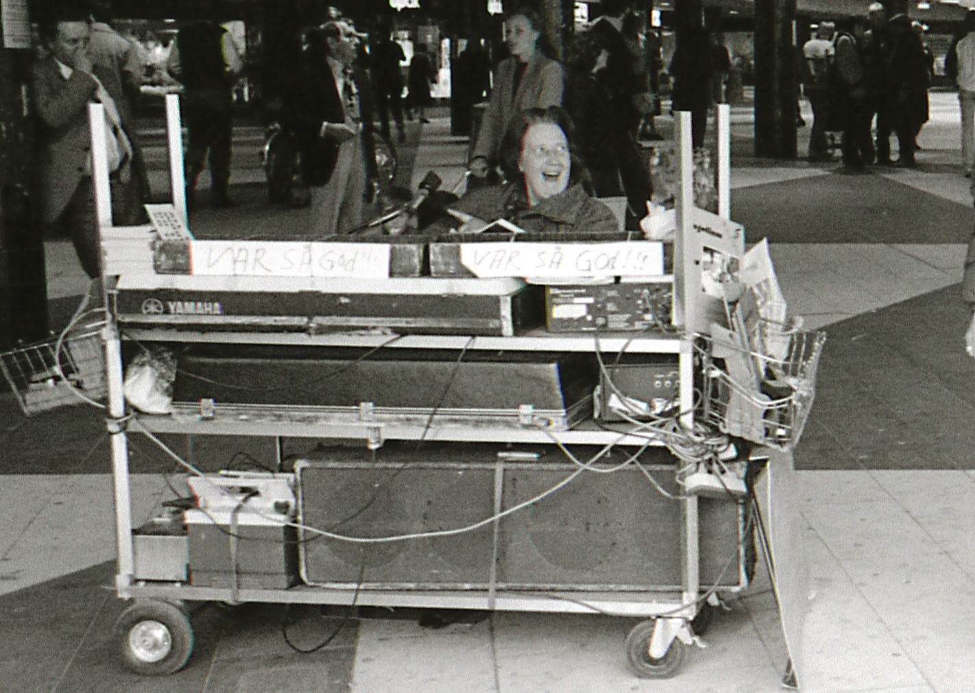 Maria Johansson "Marias enmansorkester"